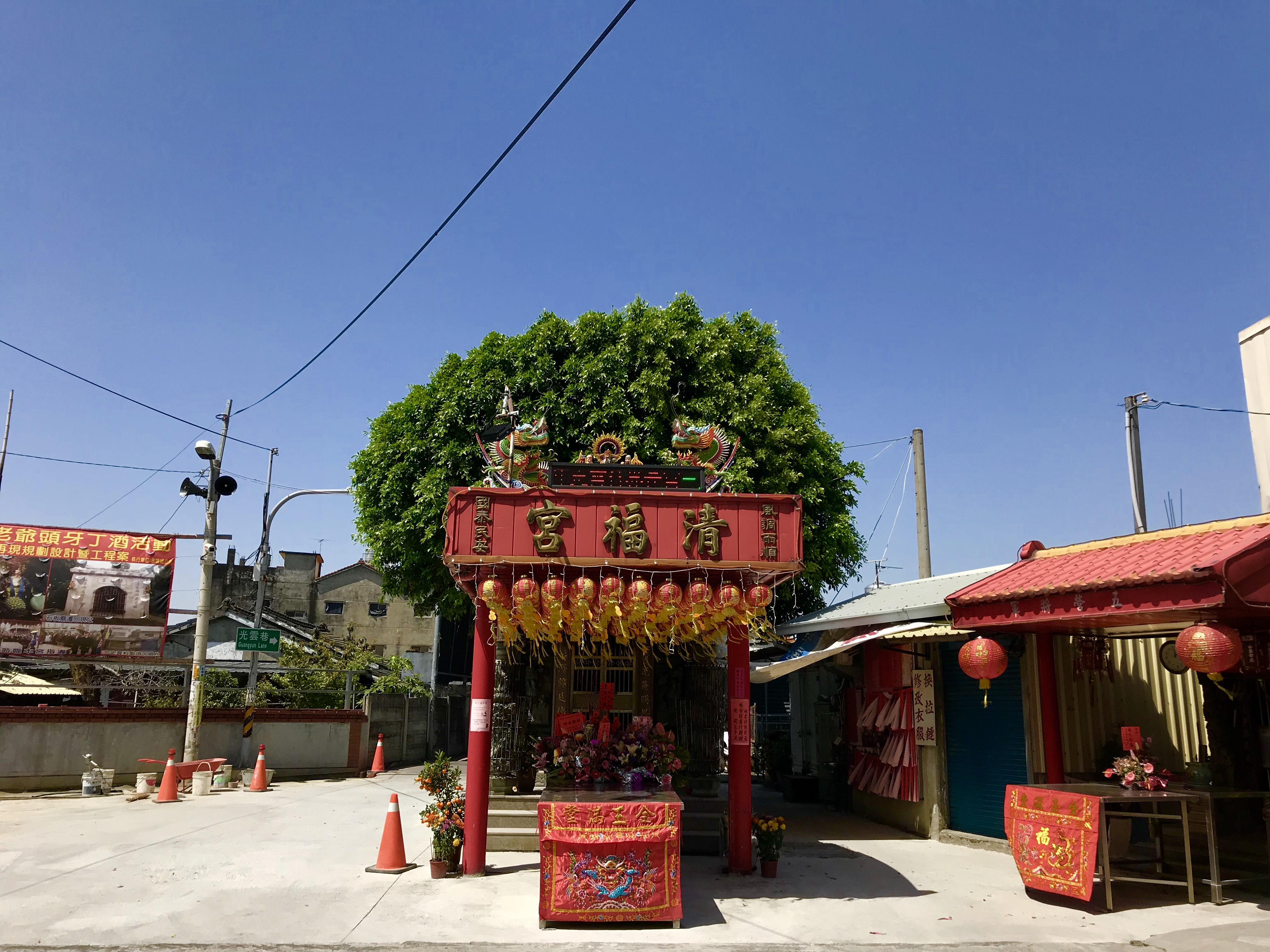 中文（台灣）: 永靖清福宮新廟正面照